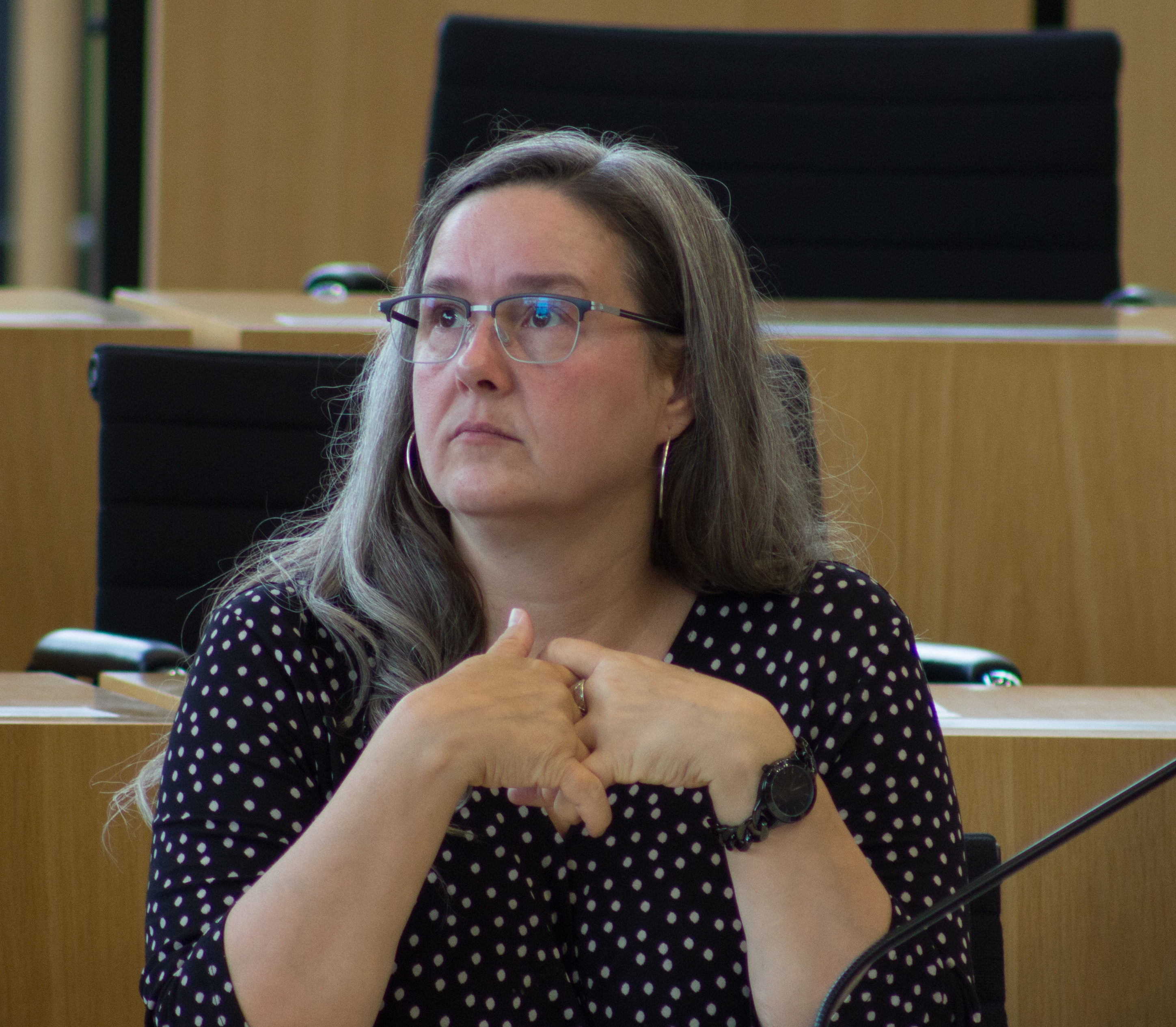 Heike Werner im Rahmen der Plenarsitzung des Thüringer Landtag am 30. August 2017 in Erfurt